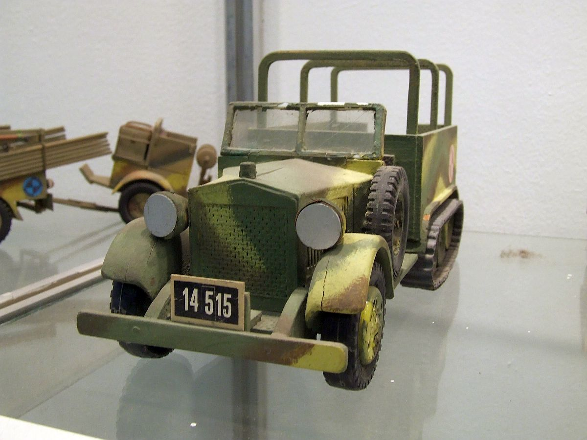 C4P, Muzeum Techniki, Warszawa.